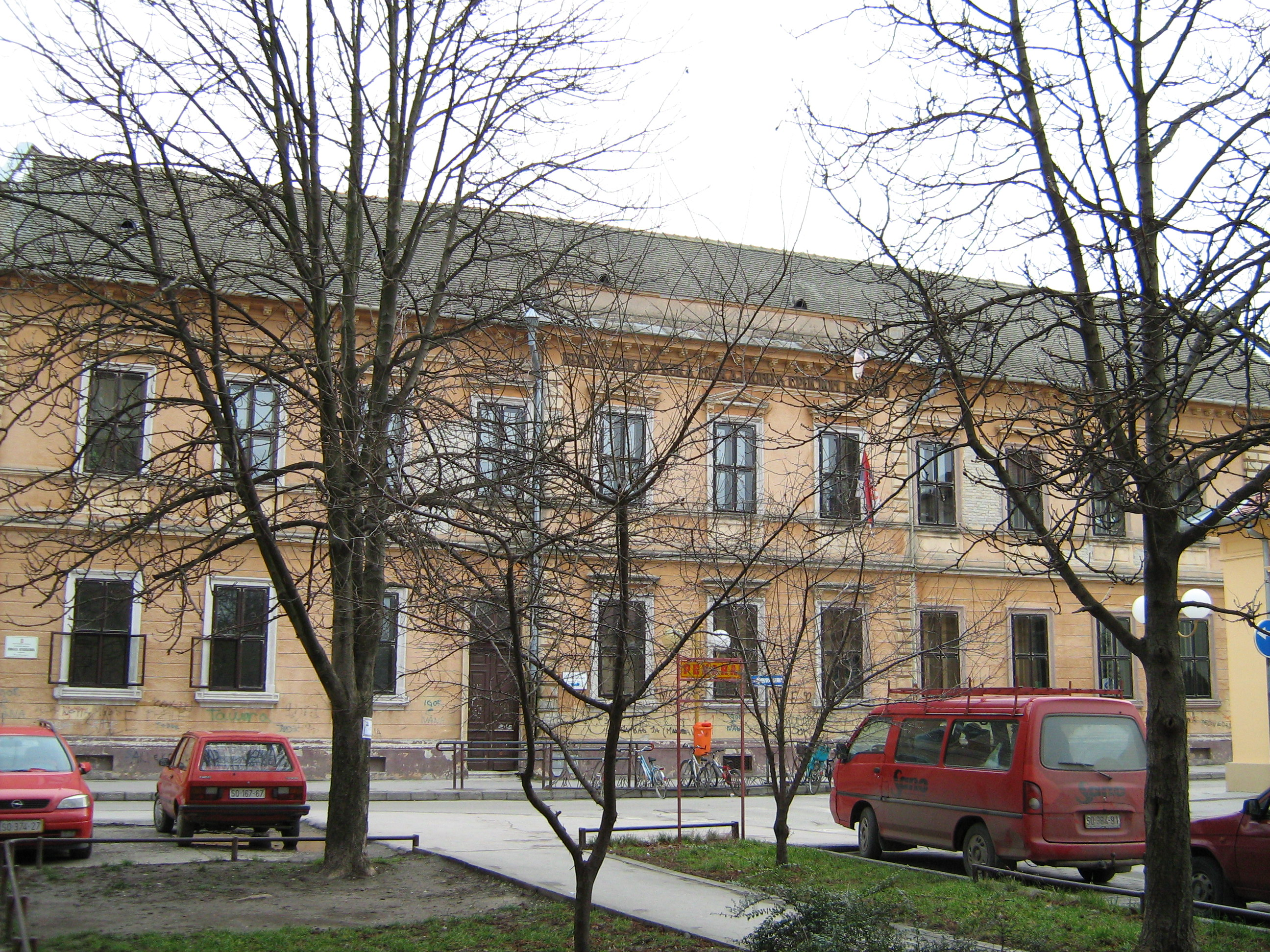 Škola Nikola Vukičević u Somboru.